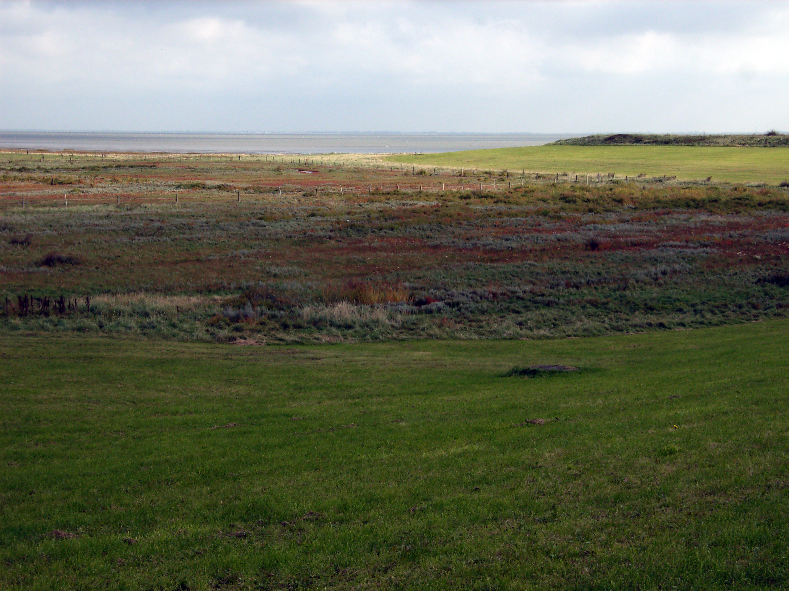 Salzwiese auf Juist (Niedersachsen), Spätsommeraspekt